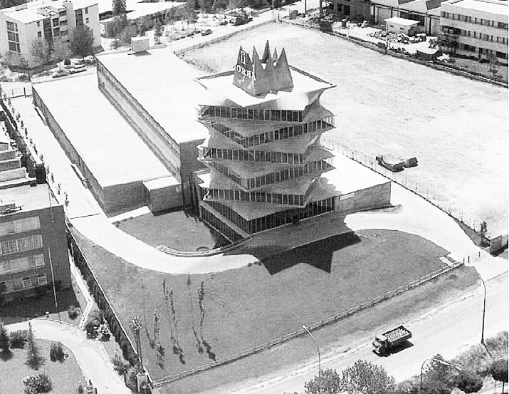 Laboratorios Jorba. (Miguel Fissac, 1965)